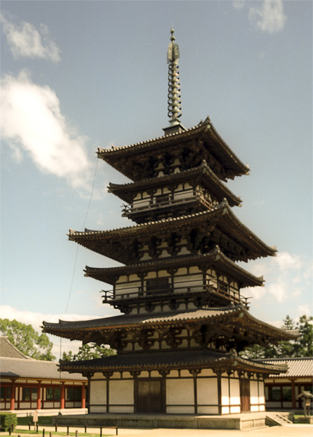 Pagoda at Yakushi-ji Buddhist temple, Nara, Japan.